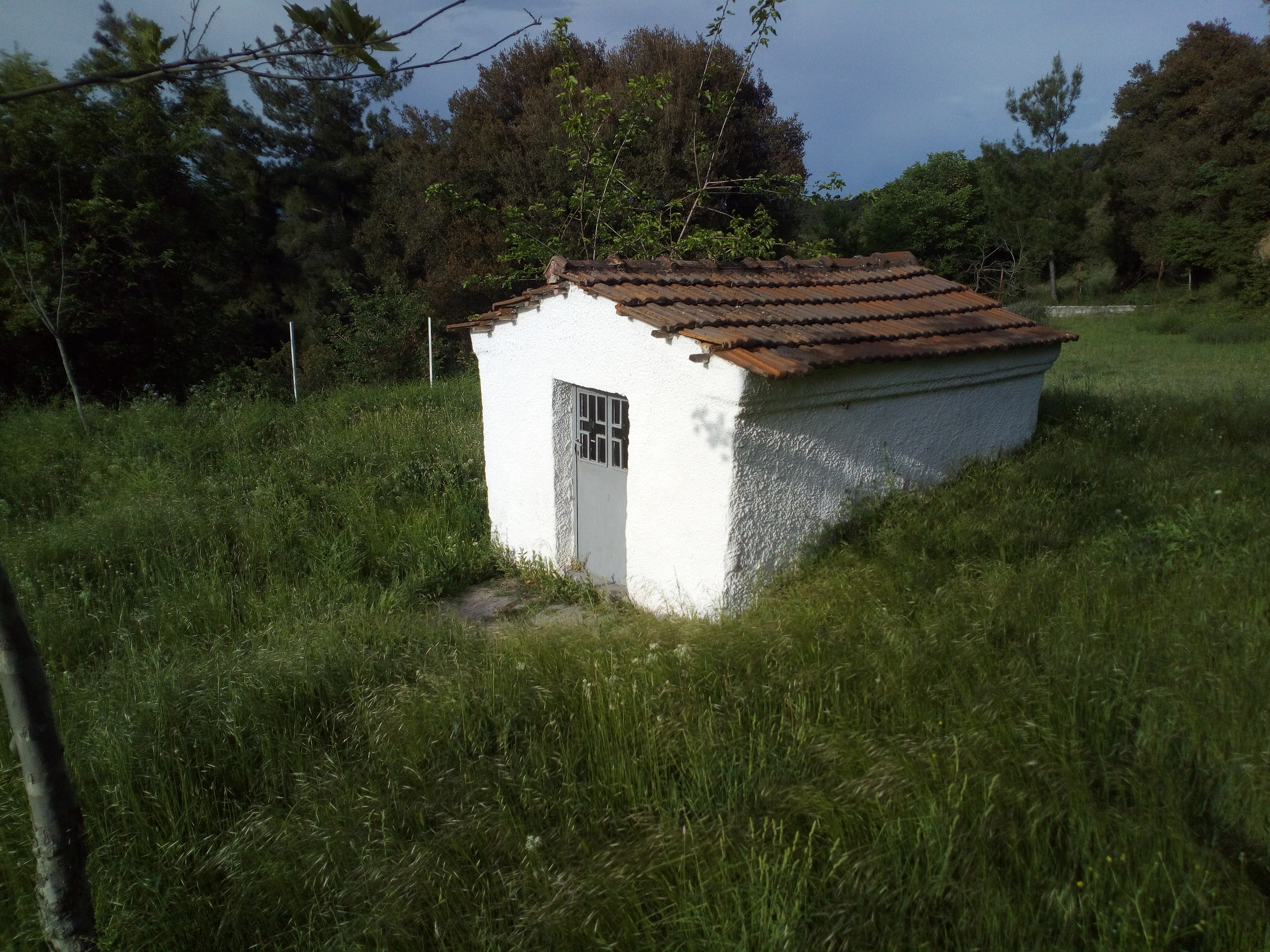 Παλιό εκκλησάκι στο χωριό Στίβος που βρίσκεται νότια σε ύψωμα στην άκρη του χωριού. DS1 20180429 181751